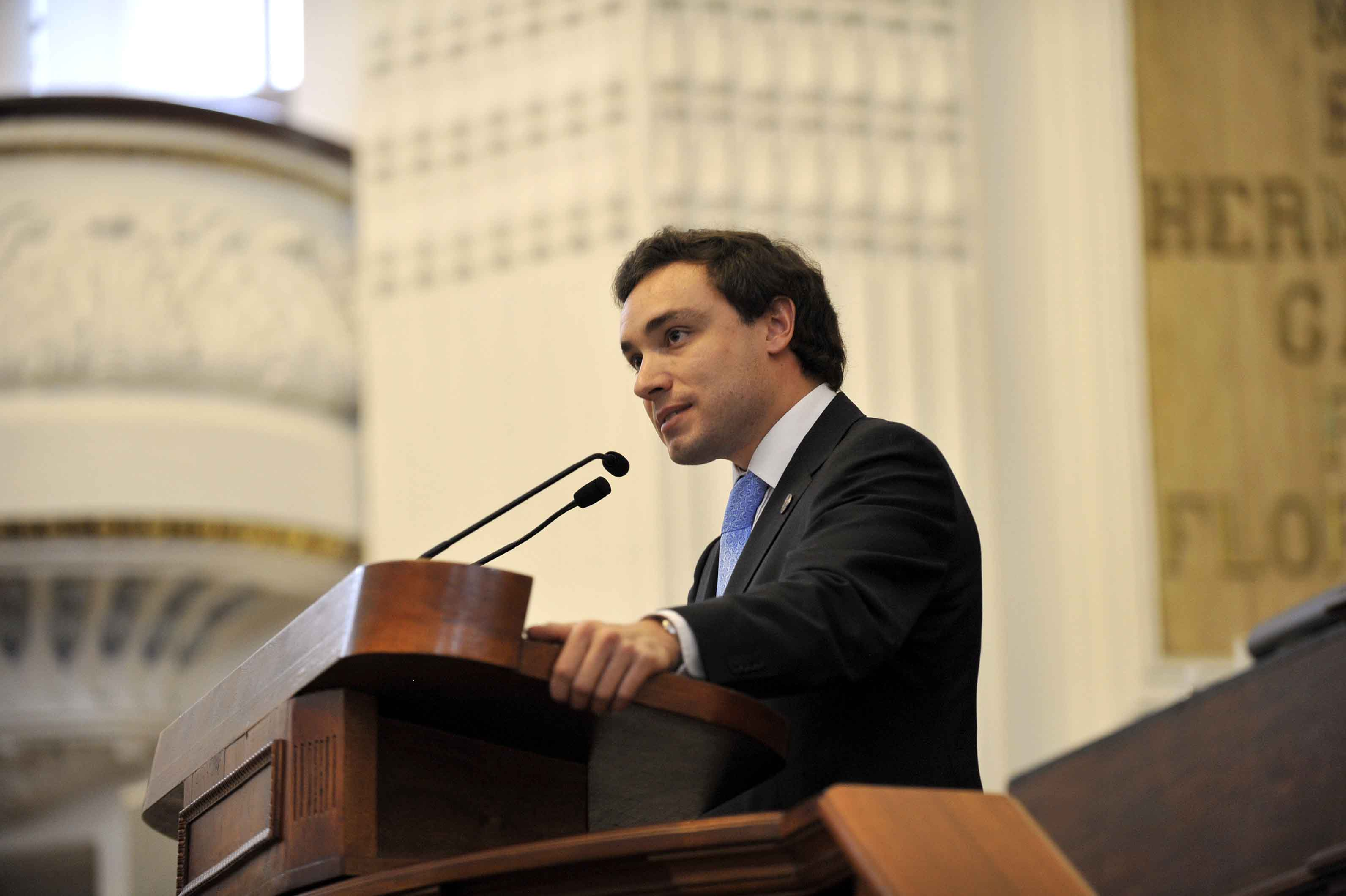 Fer Doval en sus tiempos como diputado local